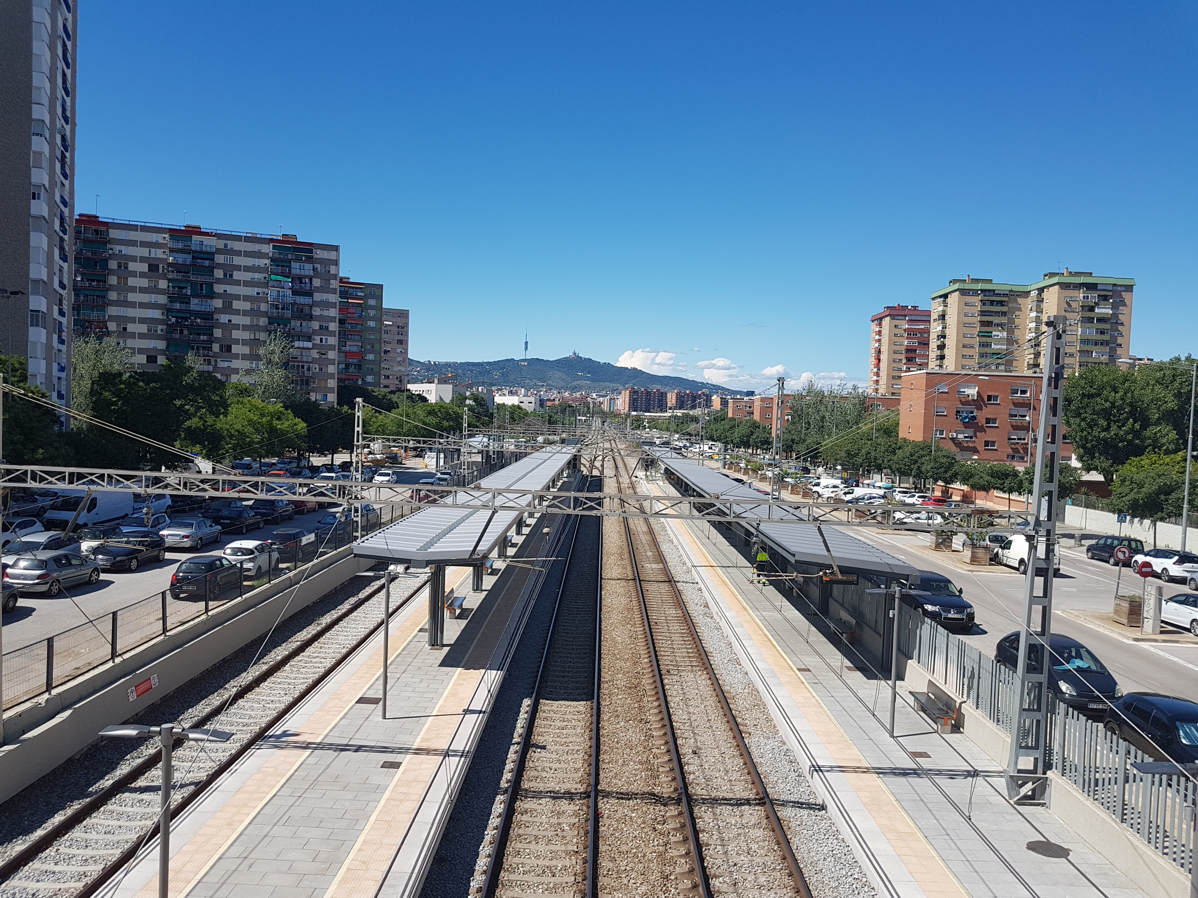 Estació de Bellvitge de la línia Barcelona-Vilanova-Valls a l'Hospitalet de Llobregat entre les estacions de Sants i el Prat.